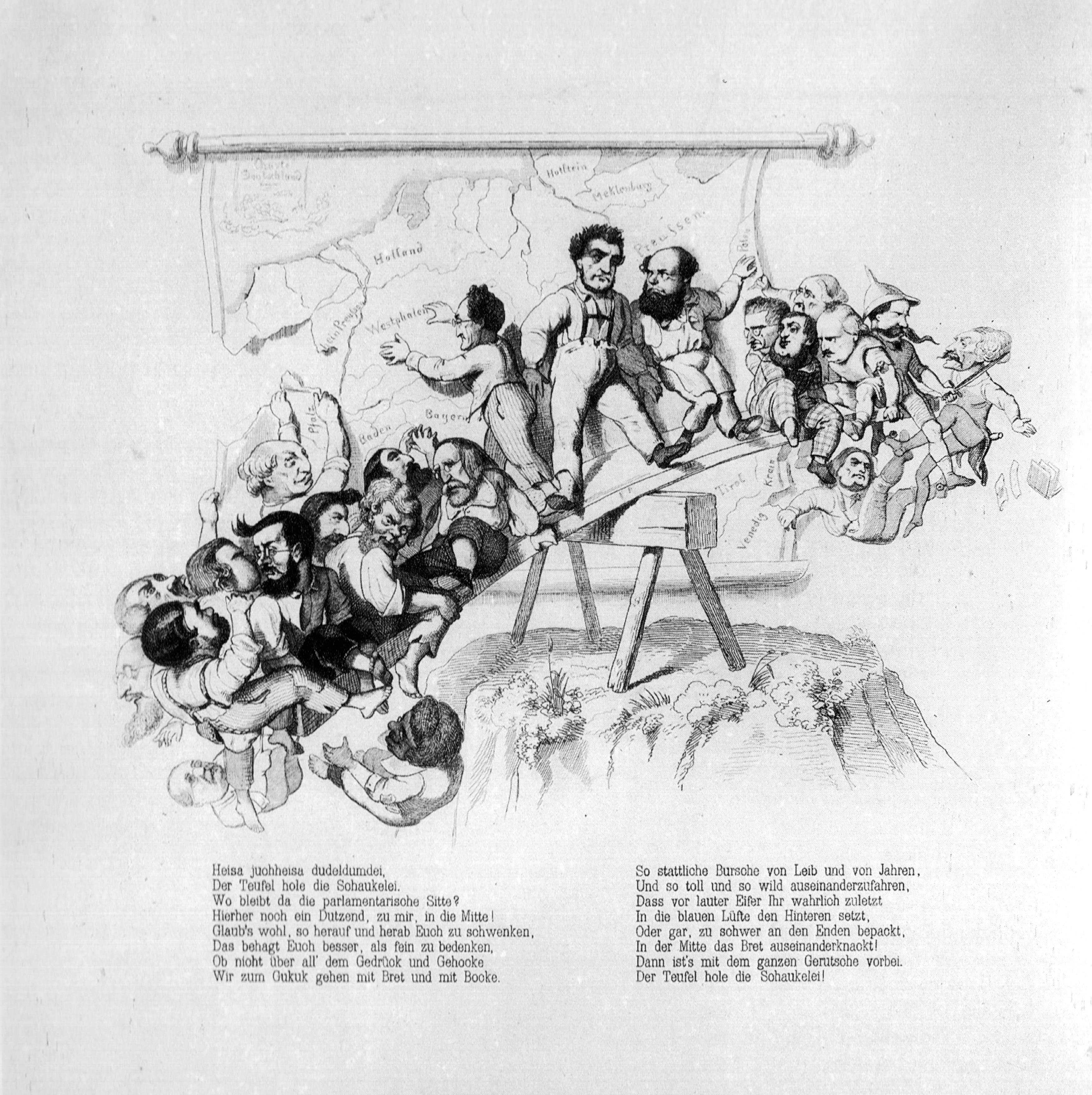 Radierung von Friedrich Pecht, 1848. “Die Parlamentsschaukel.”